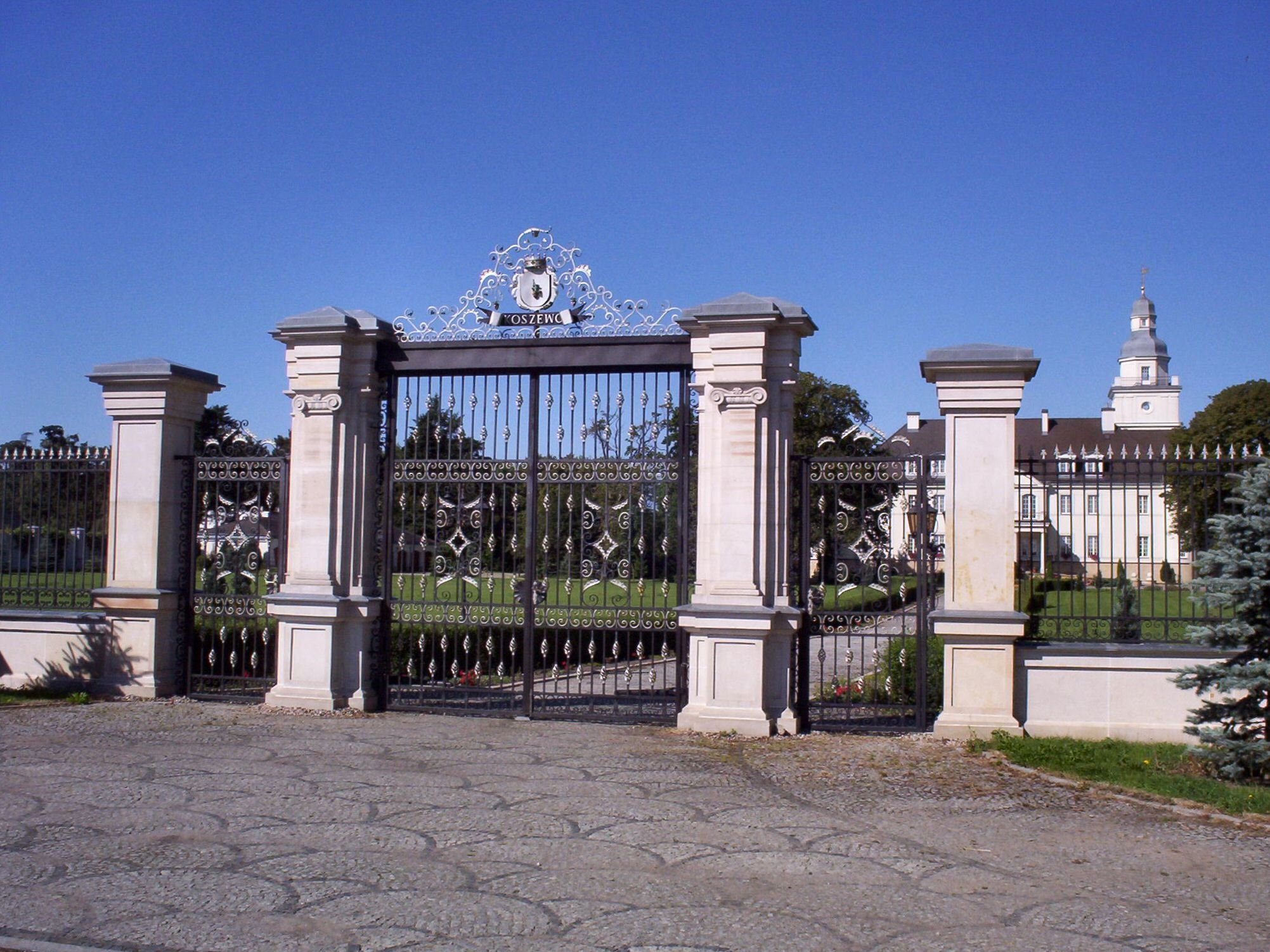 Brama do pałacu w Koszewie (gm. Stargard Szczeciński)